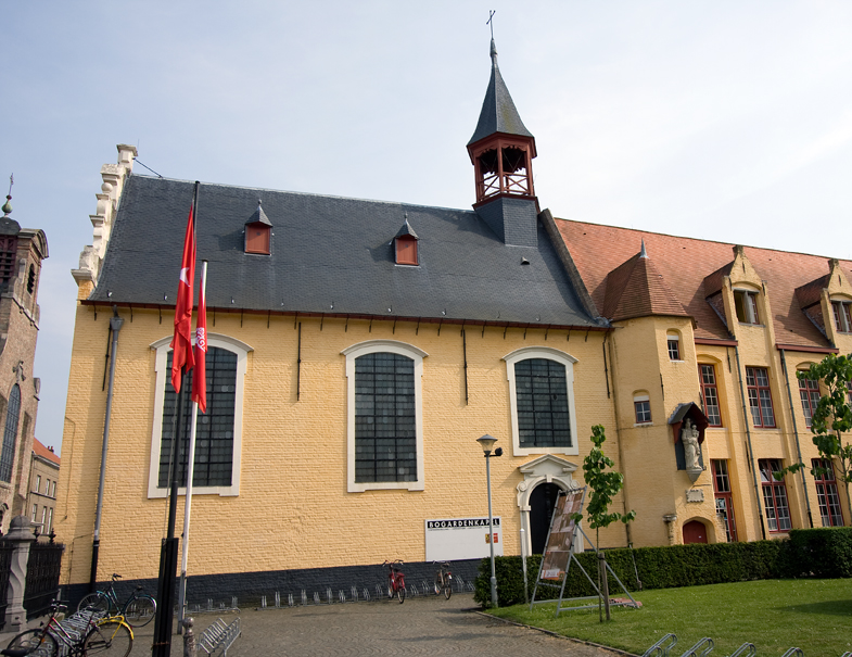 Voormalige kapel van de Bogardenschool, thans een tentoonstellingsruimte, in Brugge